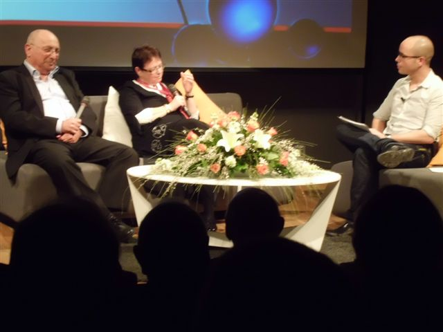 קבלת פרס לנדאו 2010 ראשון מימין המנחה טל ברמן